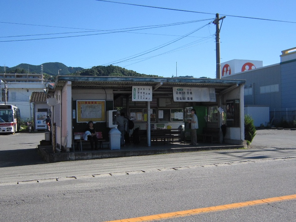 福岡県朝倉市杷木池田にある西鉄バス二日市の杷木発着所。建物は取り壊し済み。